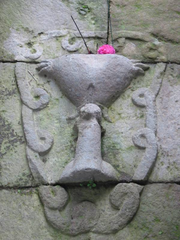 Candi Sukuh